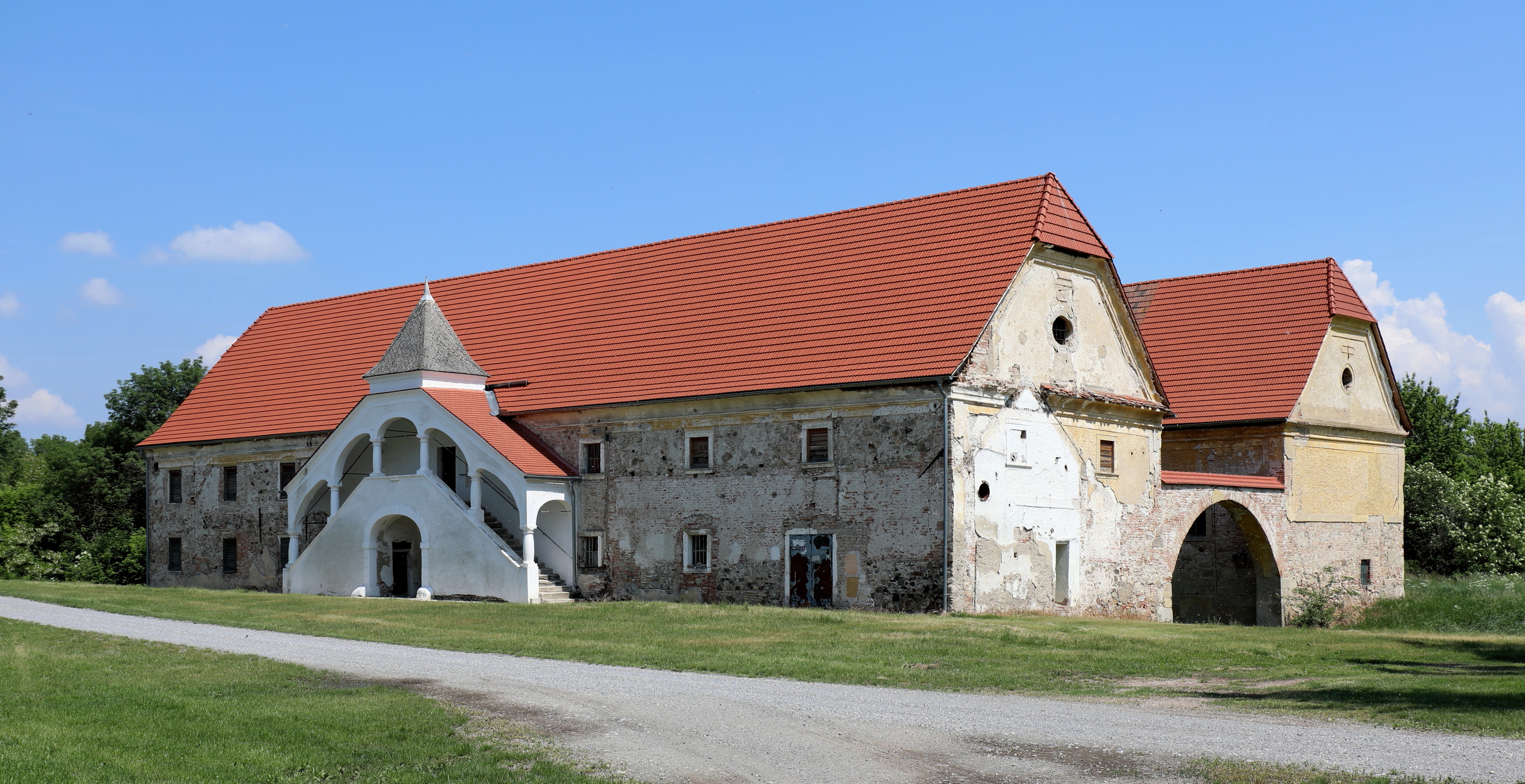 Südwestansicht des denkmalgeschützten Salmhofes in der niederösterreichischen Stadtgemeinde Marchegg. Der zweigeschossige Bau hat eine Kernbausubstanz aus der 1. Hälfte des 17. Jahrhunderts.